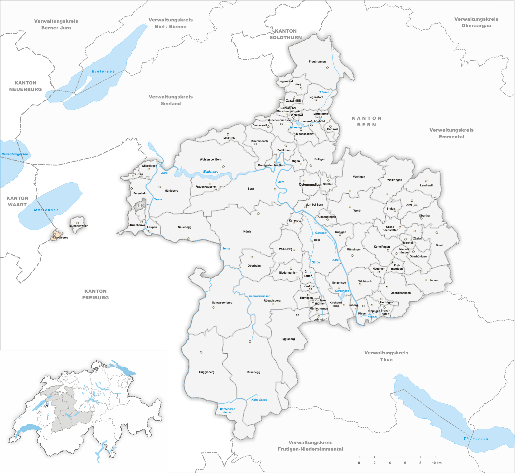 Municipality Clavaleyres